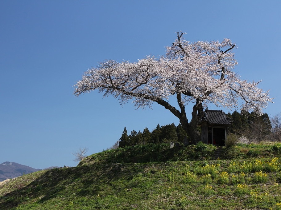 満開の小沢の桜。